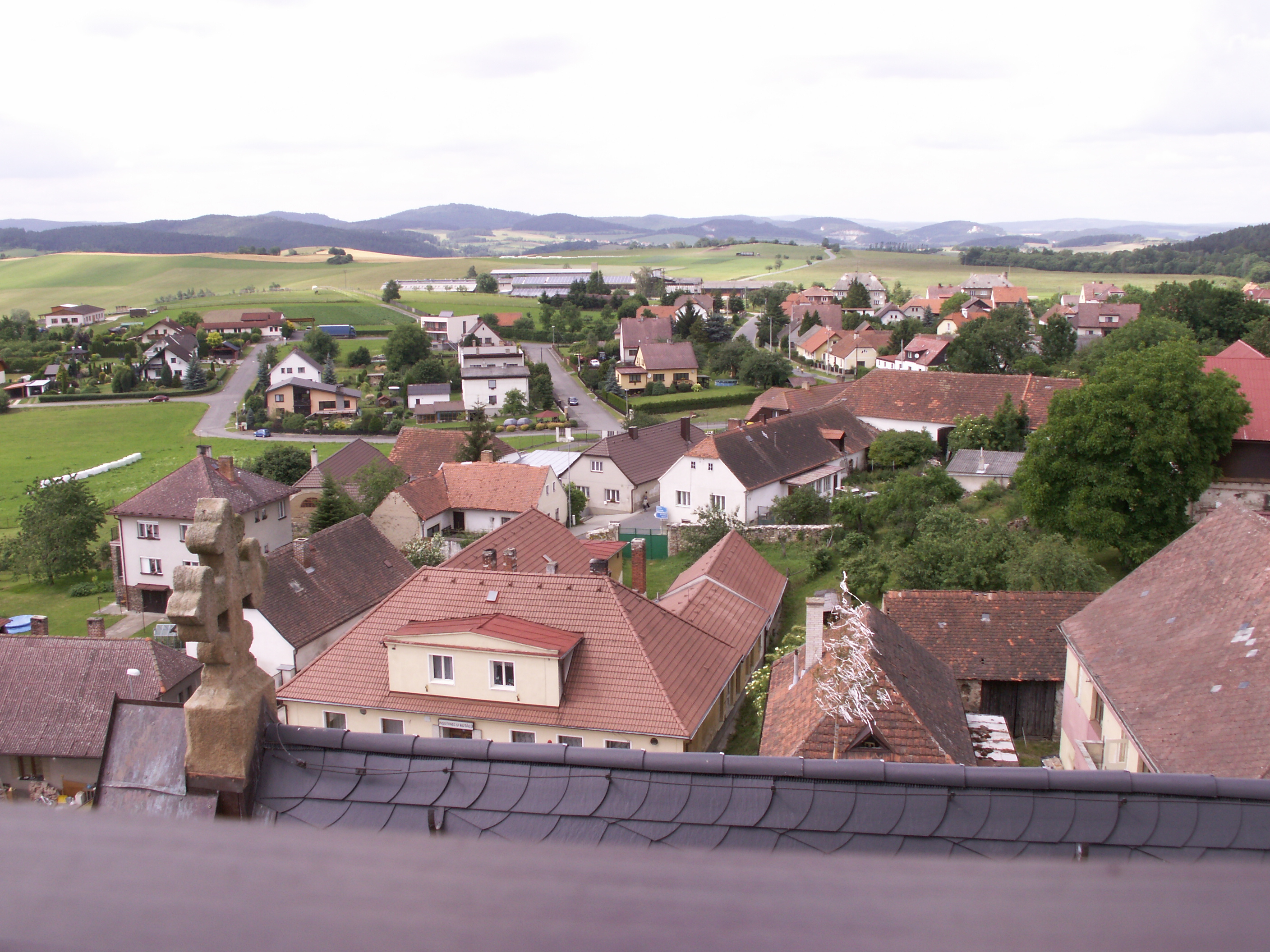 Žihobce, okres Klatovy, pohled na obec z věže kostela Proměnění Páně